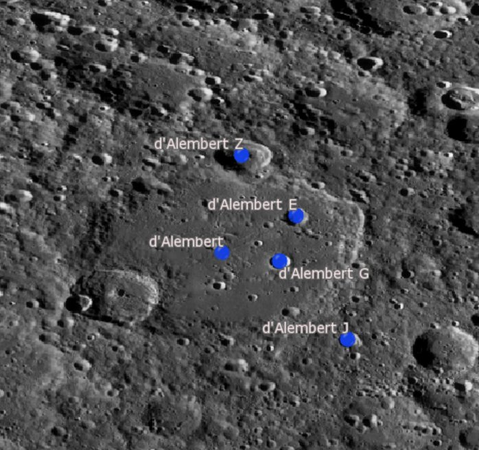 Cráter Lunar D'Alembert (LRO)